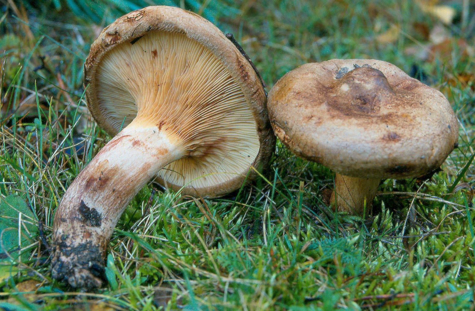 Paxillus involutus (Batsch) Fr.